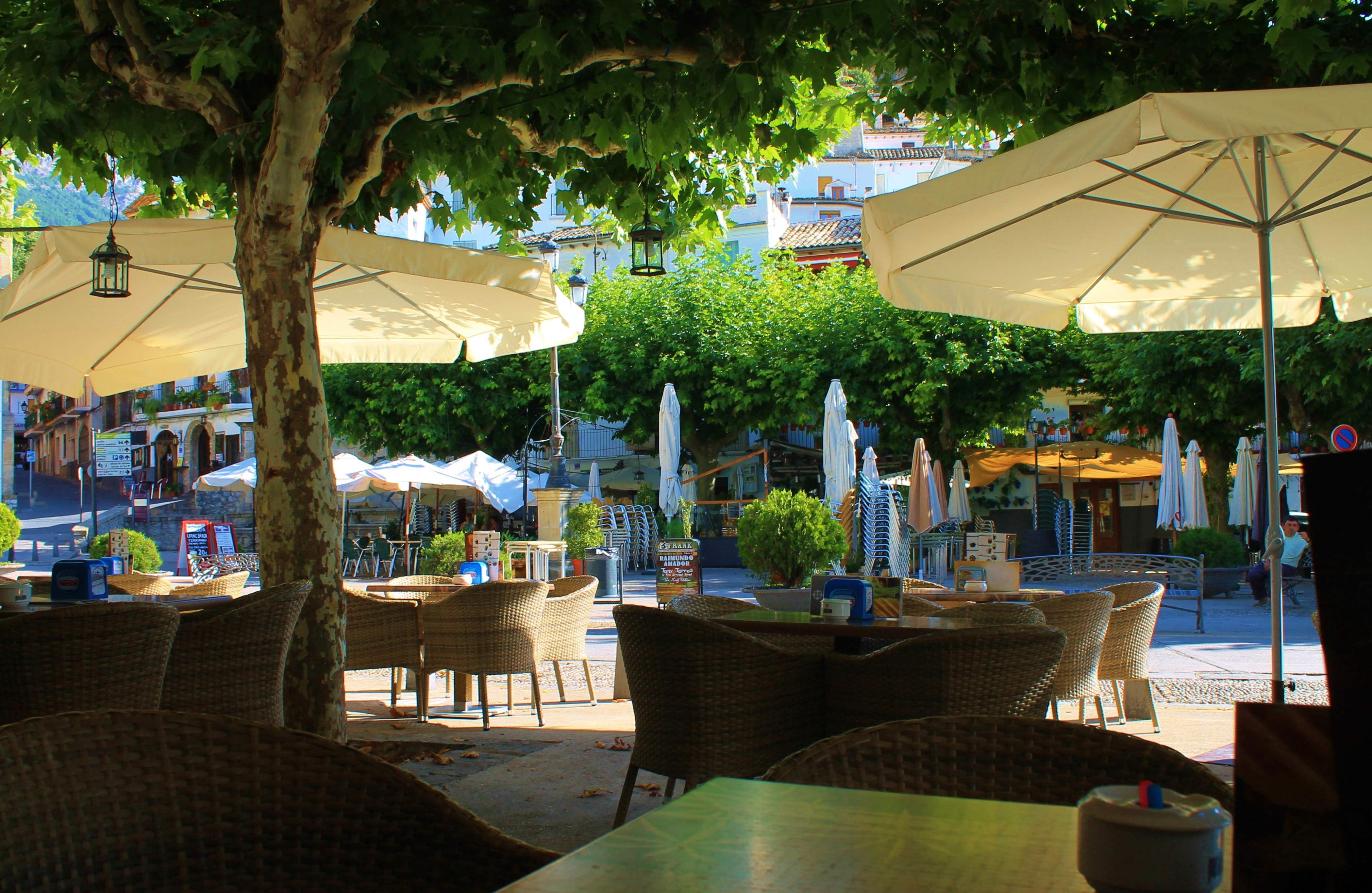 Bares en la Plaza Santa María, Cazorla